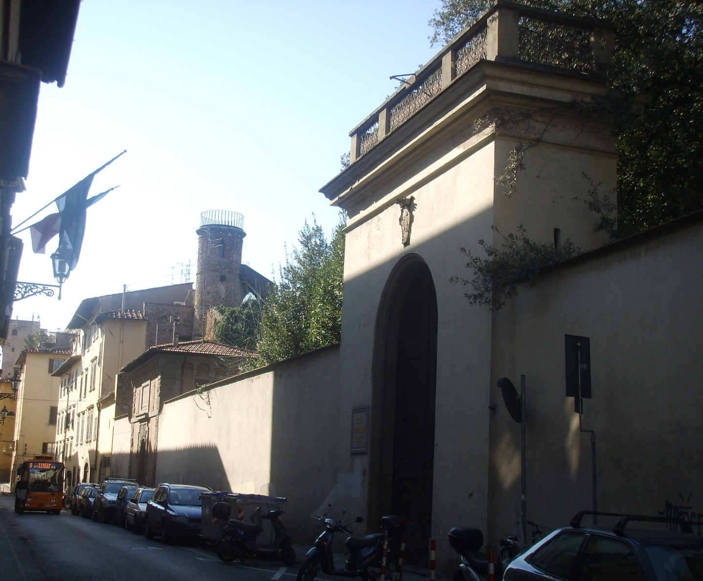 Orto_oricellari